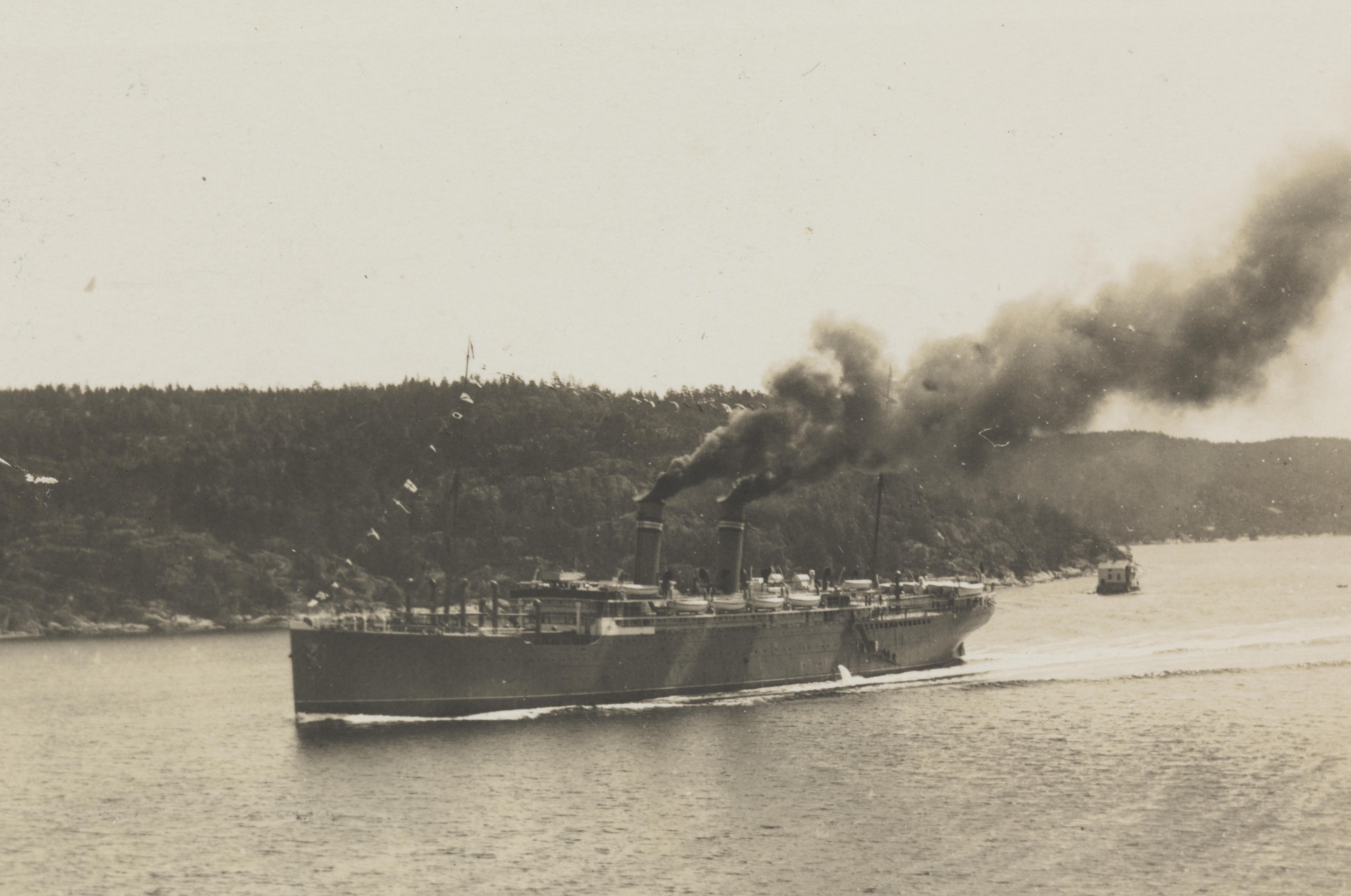 Bildet er hentet fra Nasjonalbibliotekets bildesamling Oslofjorden, Oslo, Oslo